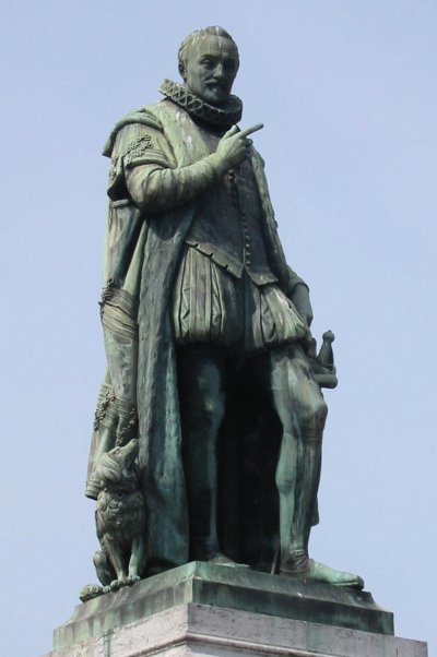 Standbeeld van Willem van Oranje, Den Haag, op het Plein, juni 2003, foto gemaakt en ter beschikking gesteld voor vrij gebruik door Gebruiker:Ellywa